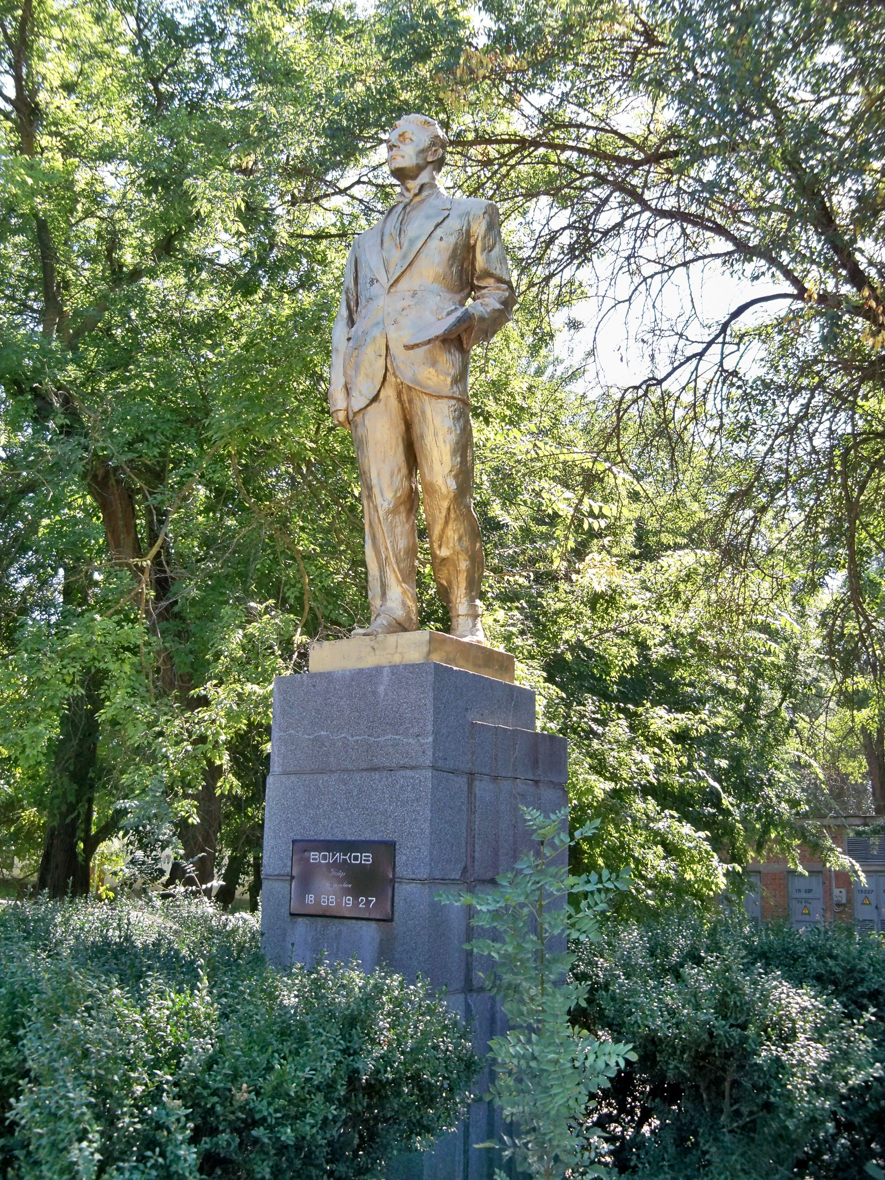 Пам'ятник П. Л. Войкову. Дата споруди: 1960 р., Керч, вул. Войкова/вул. Р.Люксембург